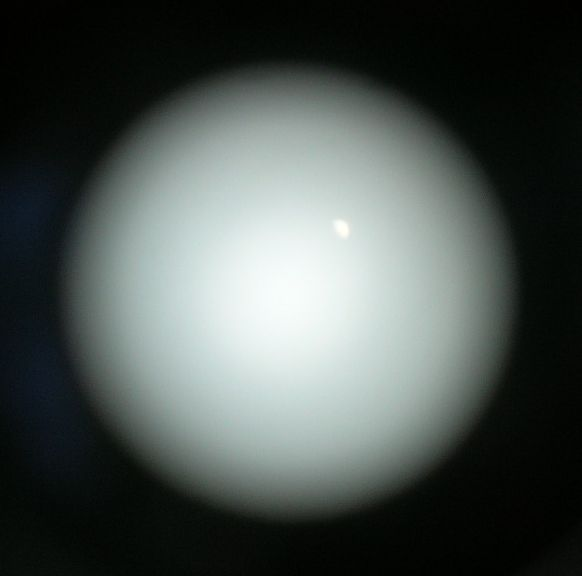 Planet Venus (Tagbeobachtung 22.4.06)